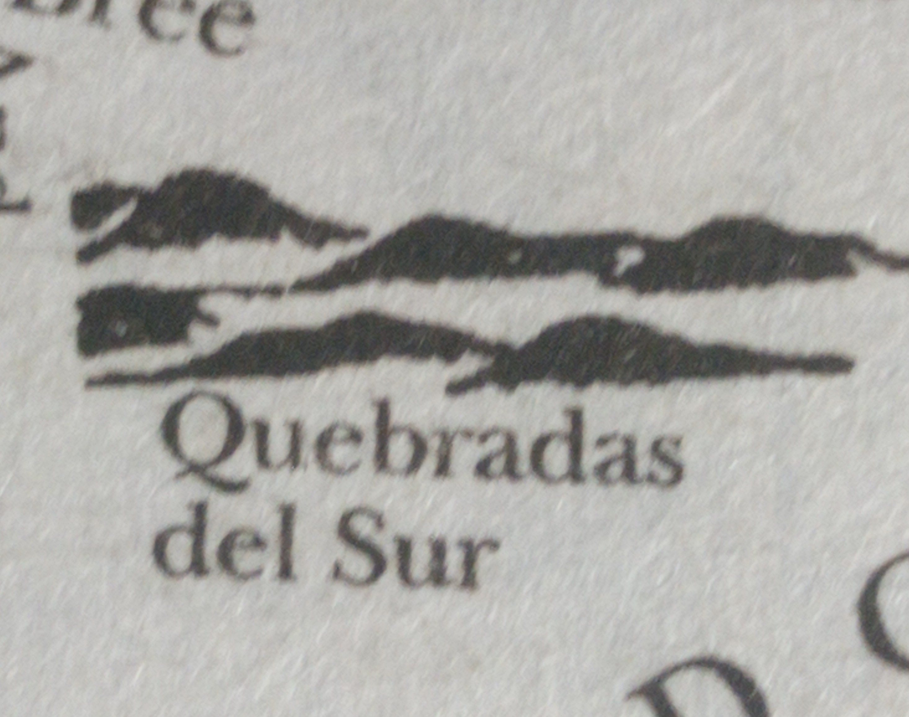 En está imagen se representan en un mapa las Quebradas del Sur, elevaciones pertenecientes al legendarium del escritor J.R.R. Tolkien.